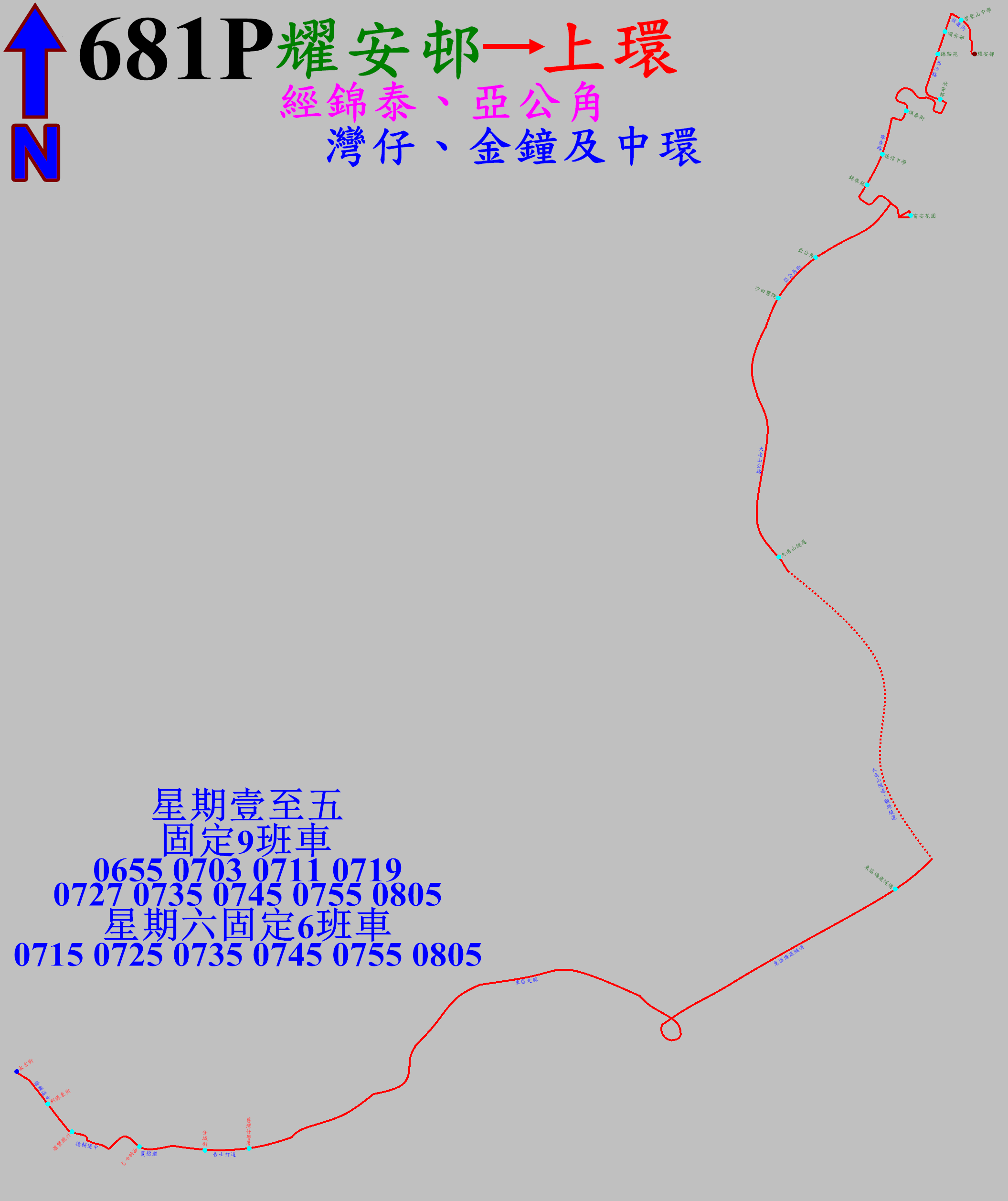 中文（香港）: 過海隧巴681P線港島方向的走線圖